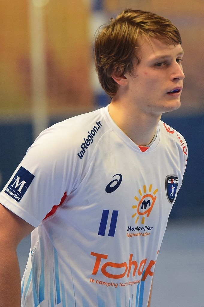 Jure Dolenec, arrière droit au club Montpellier Agglomération Handball. Le 03 décembre 2014 lors du match PSG Handball / Montpellier AHB.